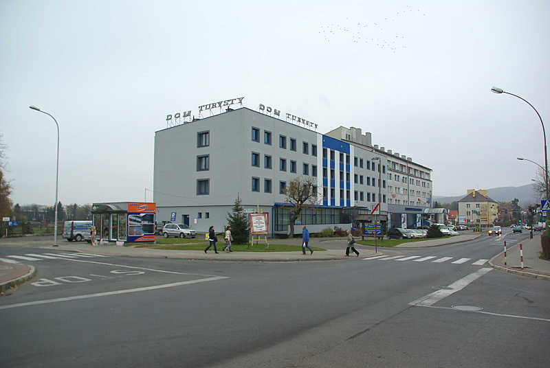 Hotel Dom Turysty Sanok, Street crossing Mickiewicza & Żwirki i Wigury